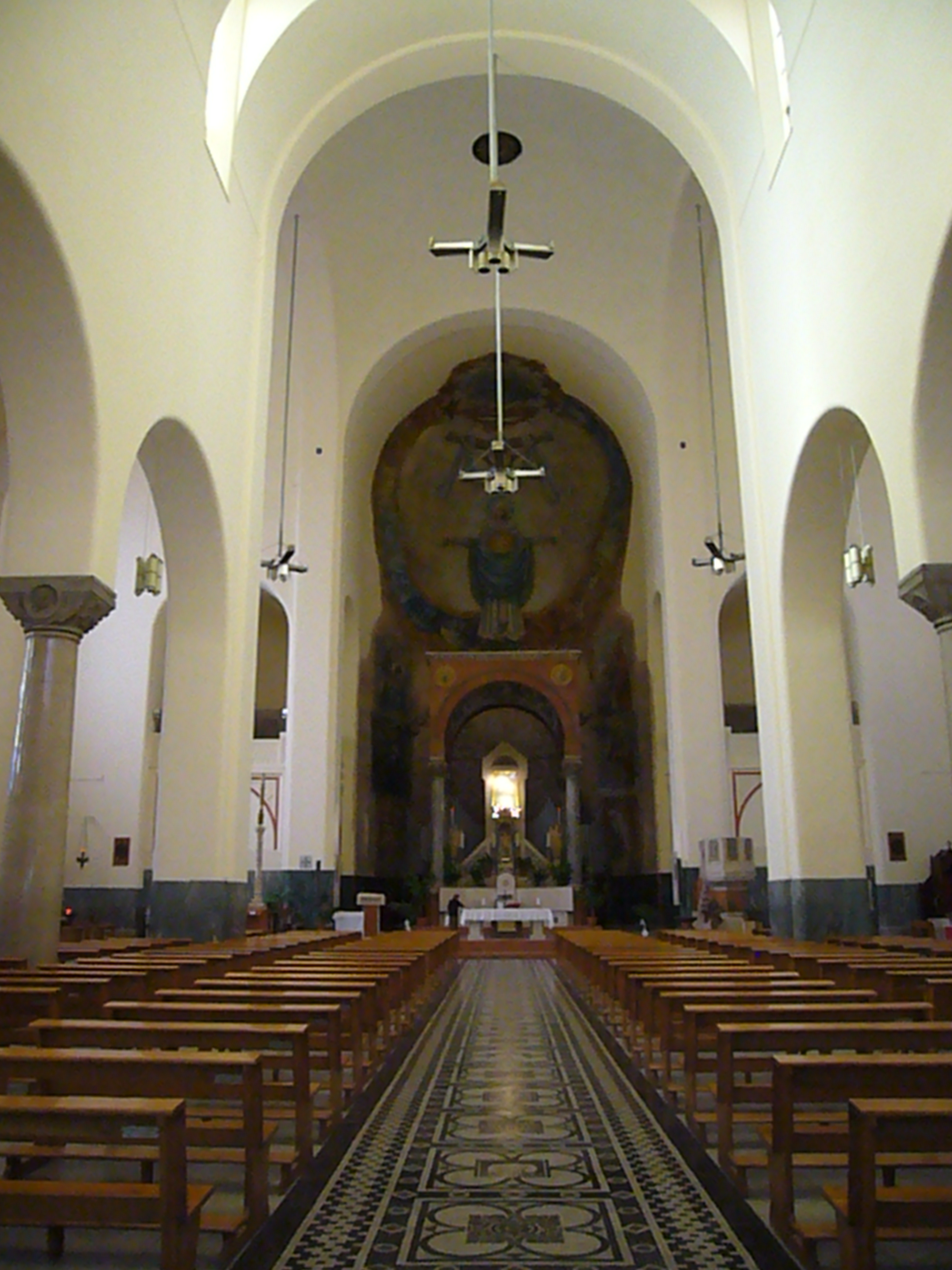 Roma, Santa Maria Liberatrice a Testaccio. Interno.